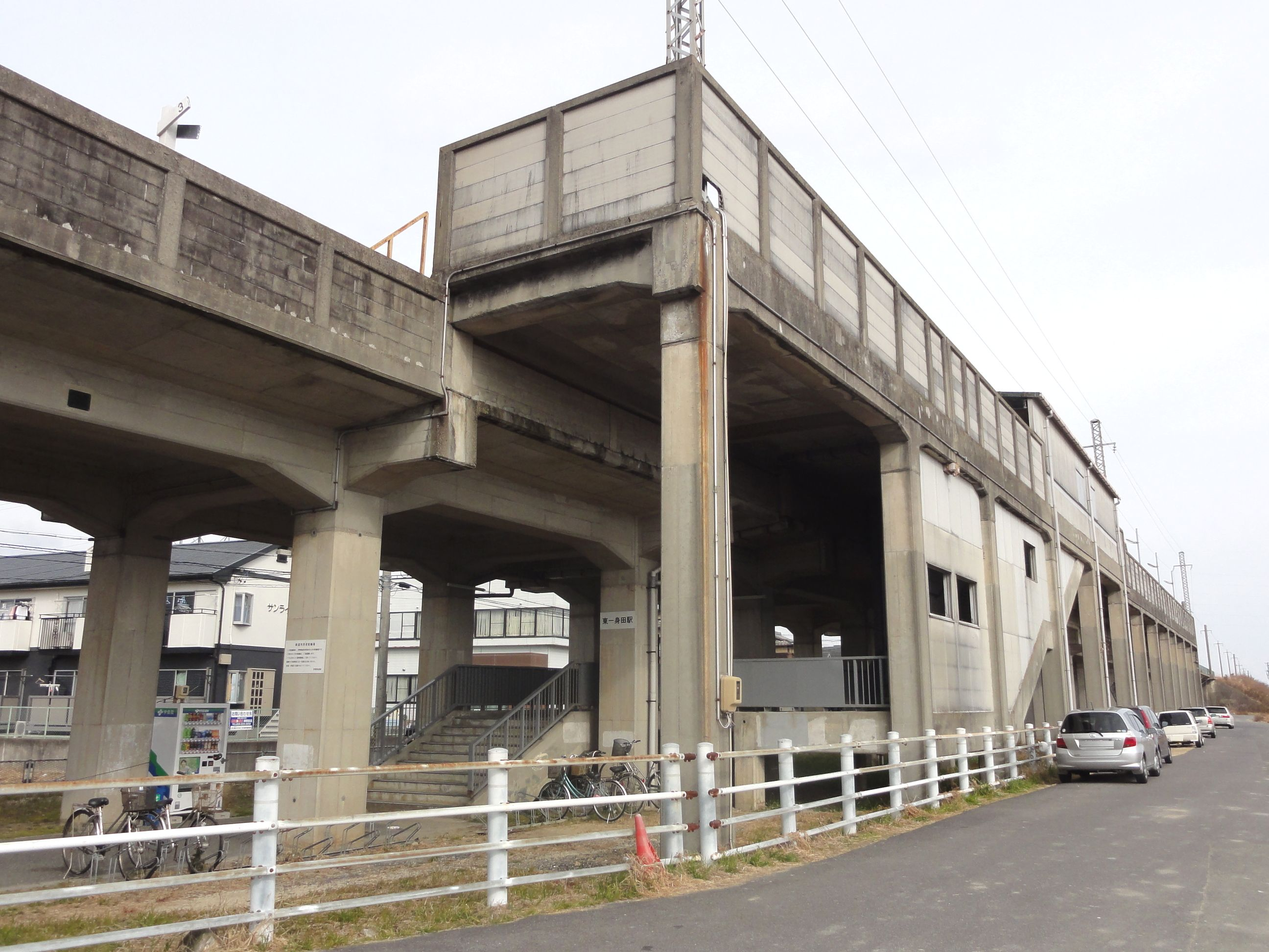 東一身田駅